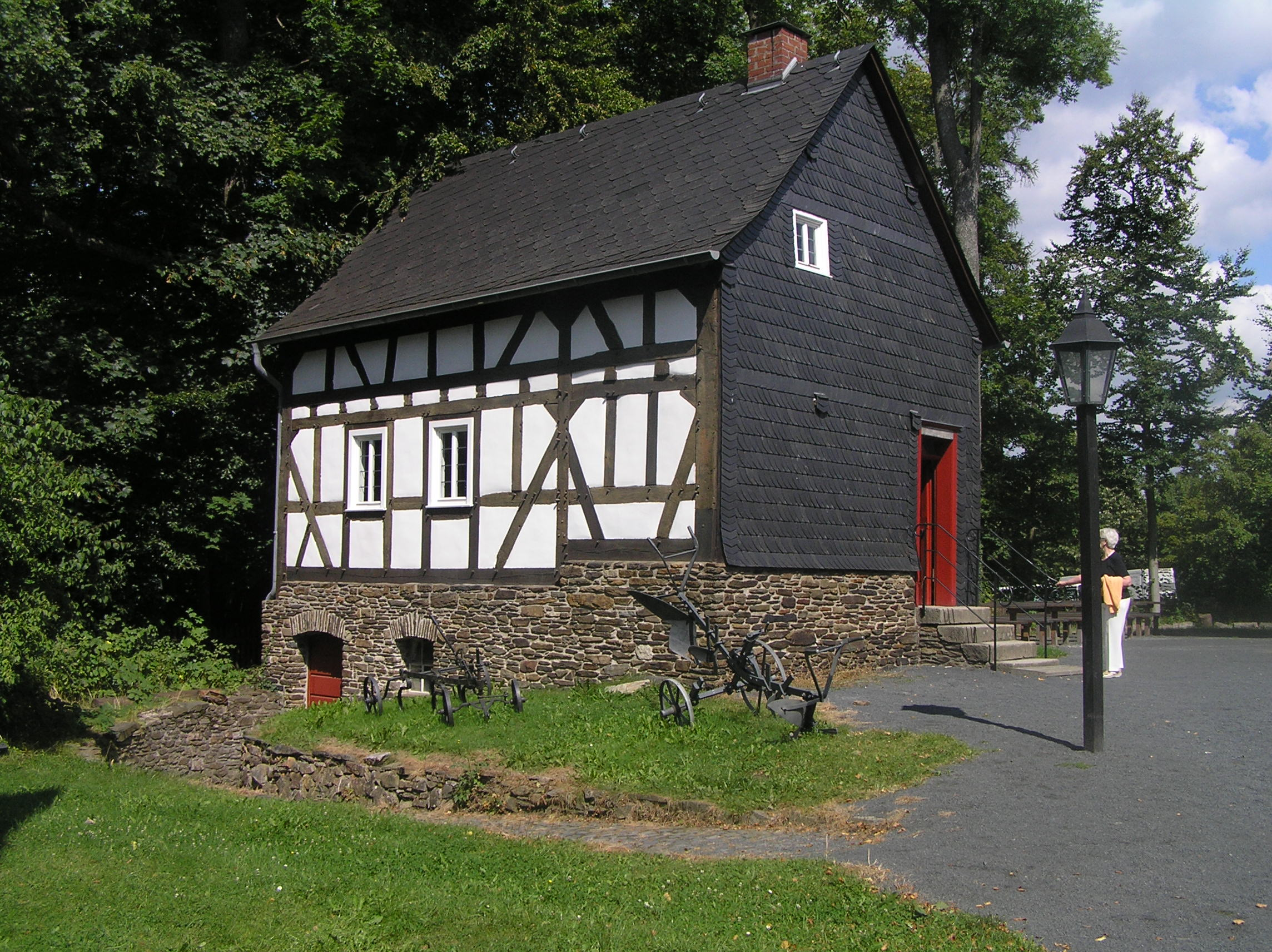 Alte Schule aus Obermörsbach. Jetzt Teil des Landschaftsmuseums Westerwald in Hachenburg.